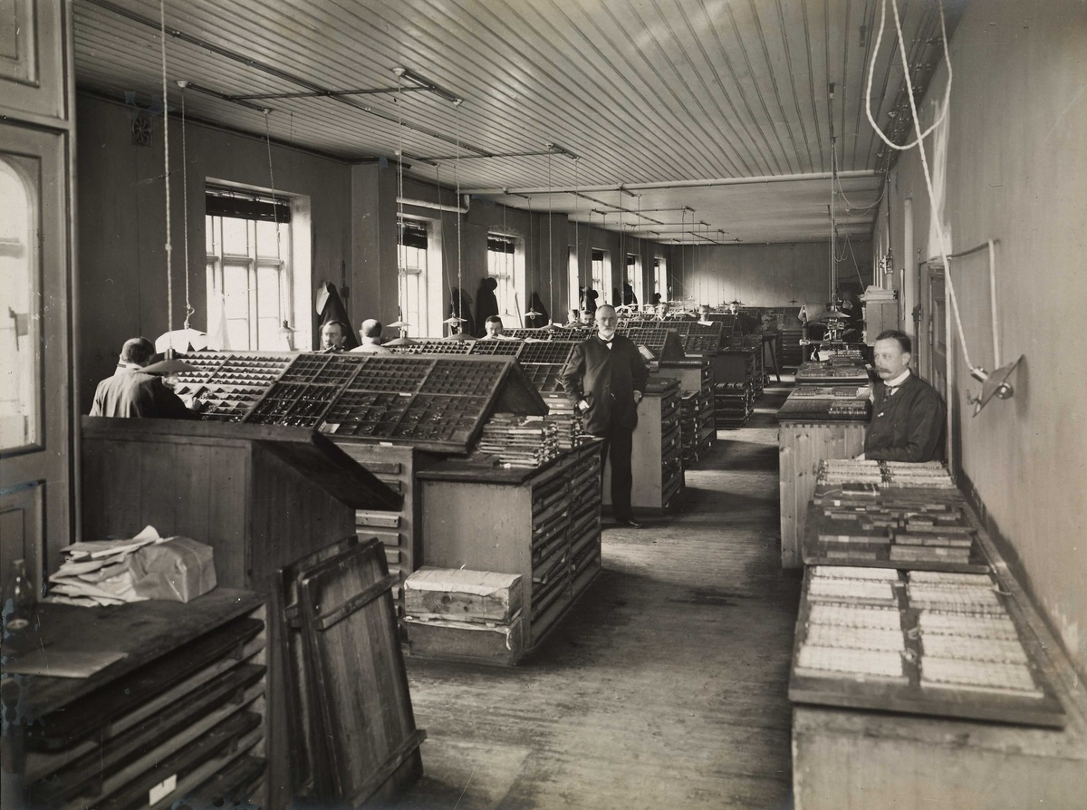 Steenske bogtrykkeri og forlag, Rådhusgata 30 B, anno 1910